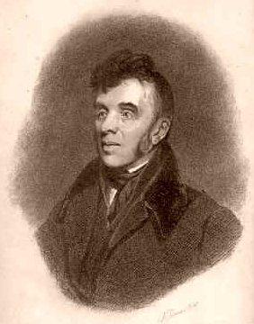 Ebenezer Elliott (1781-1849), an English poet